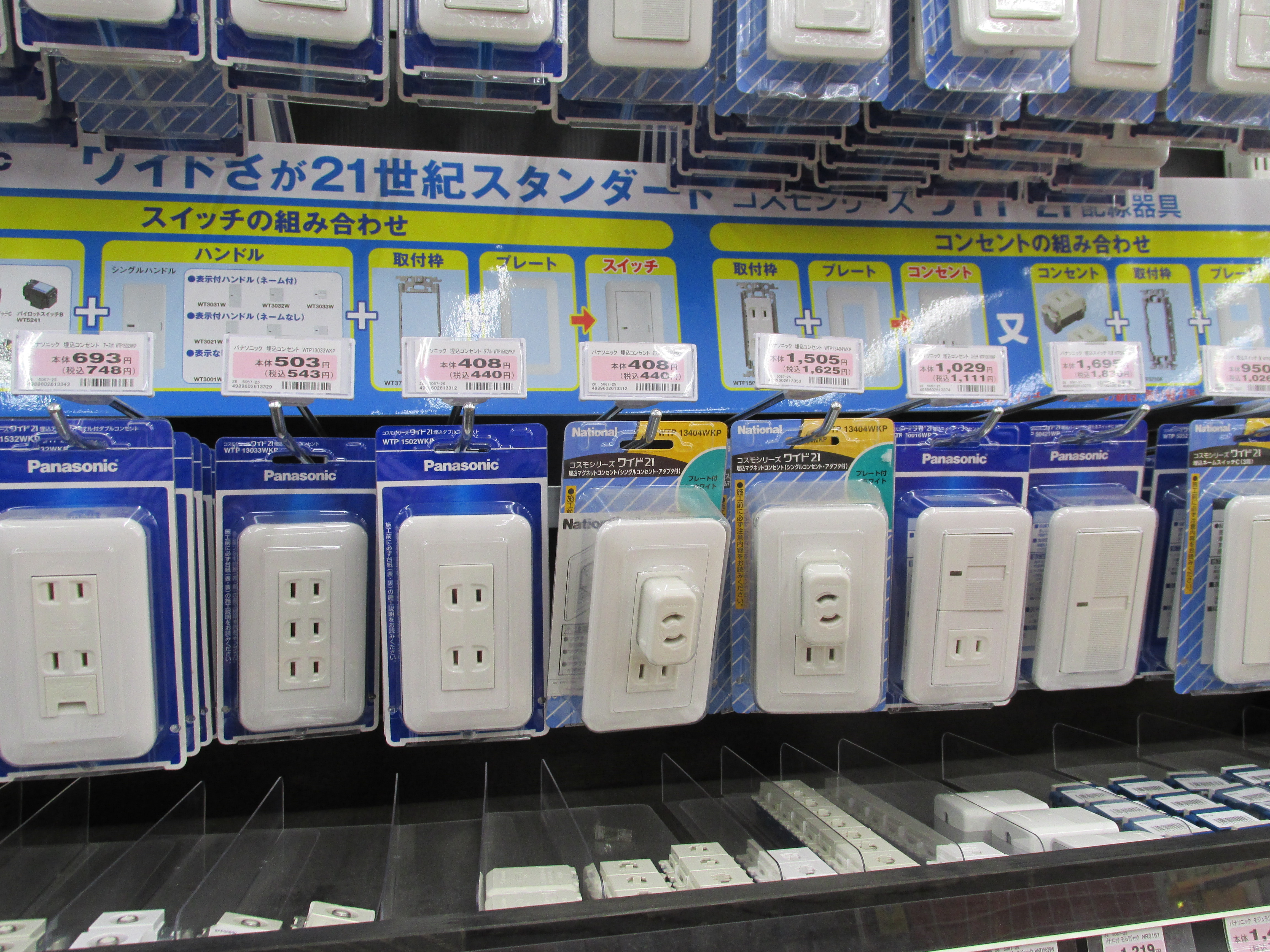 2014年現在も市場に残る｢ナショナル｣ブランドの電設パーツ(愛媛県内のホームセンターで撮影)